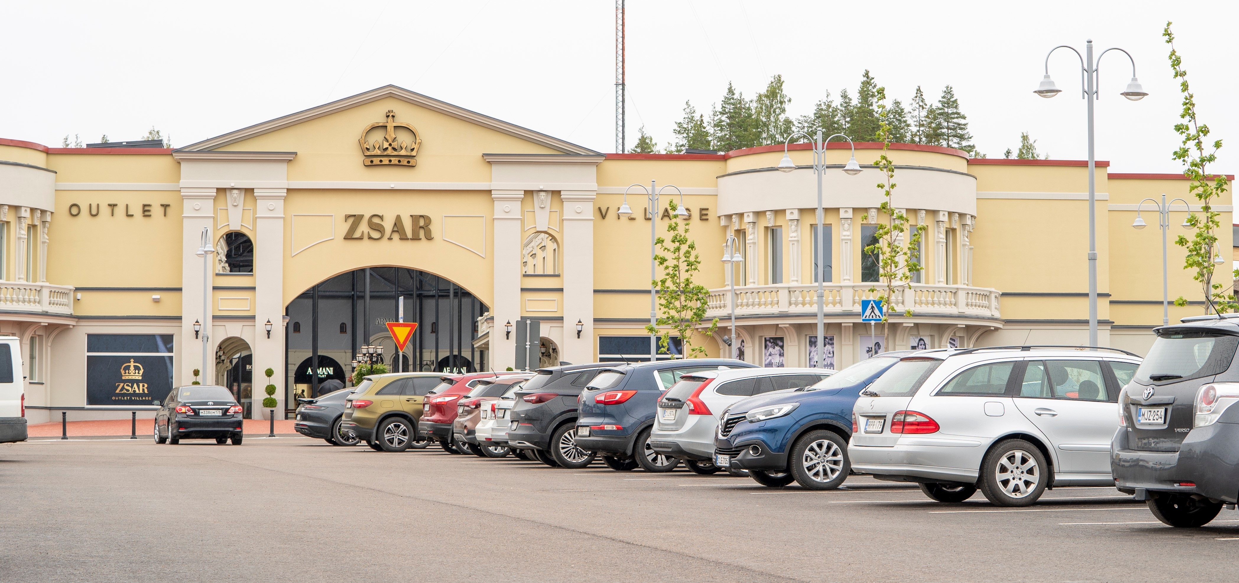 Zsar Outlet Village